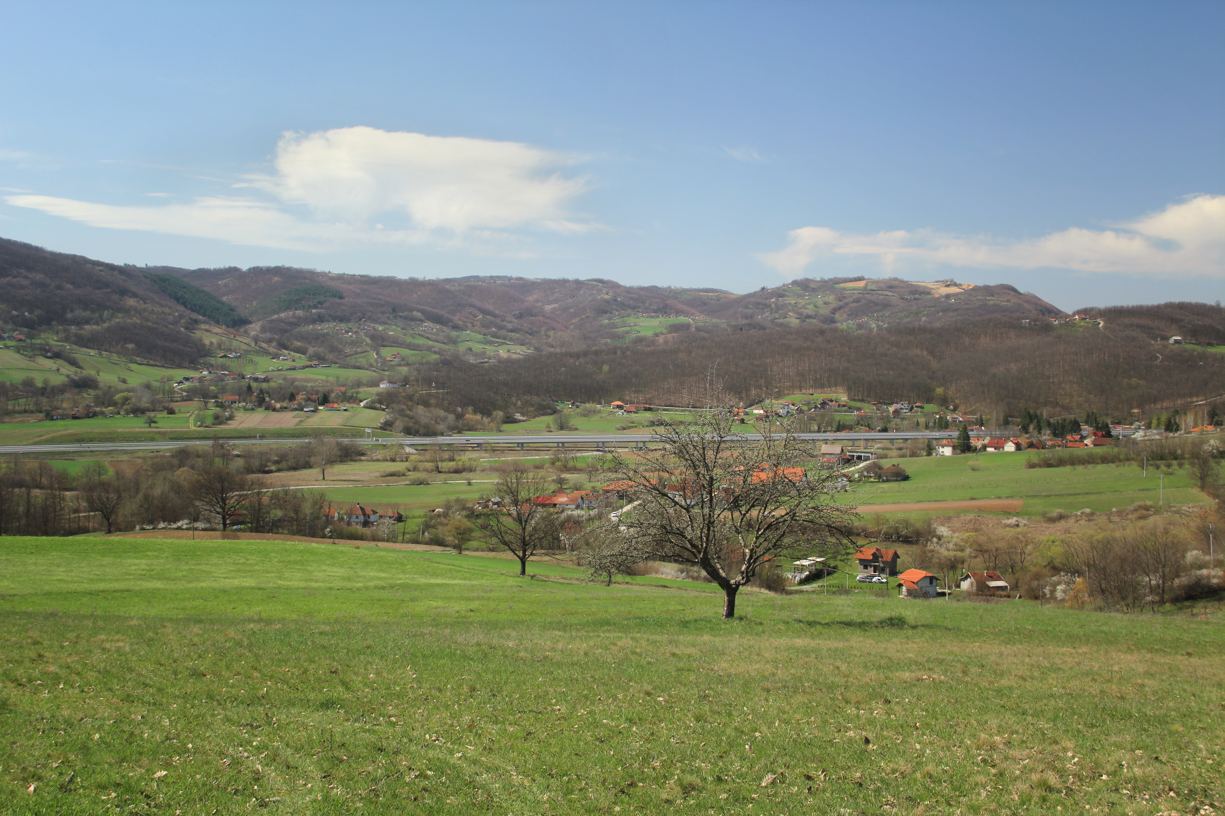 Šarani kod Gornjeg Milanovca